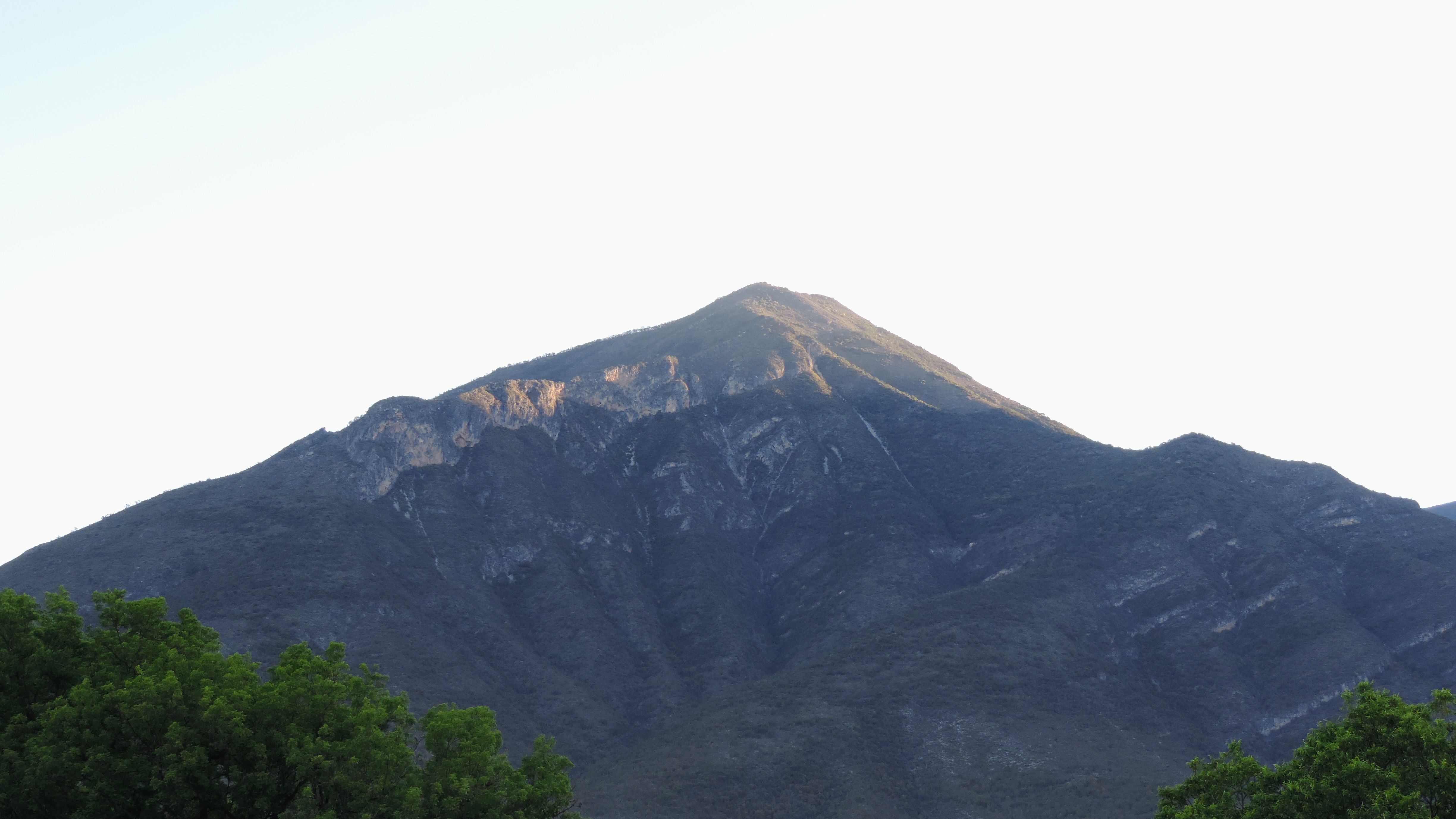 Cerro el Viejo desde el Río Blanco, Zaragoza, Nuevo León